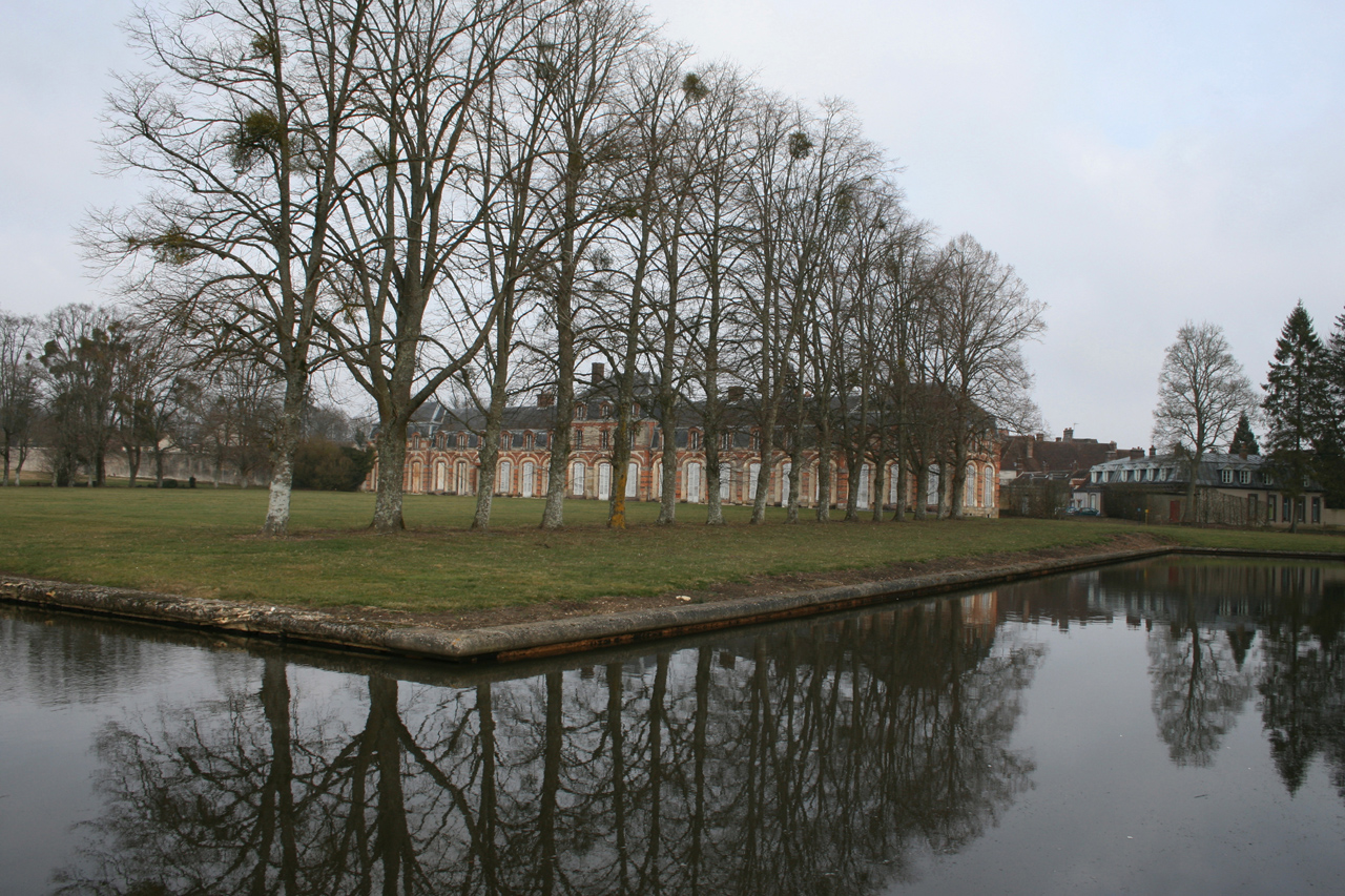 Parc du chateau de La Ferté-Vidame ( Eure-et-Loir )